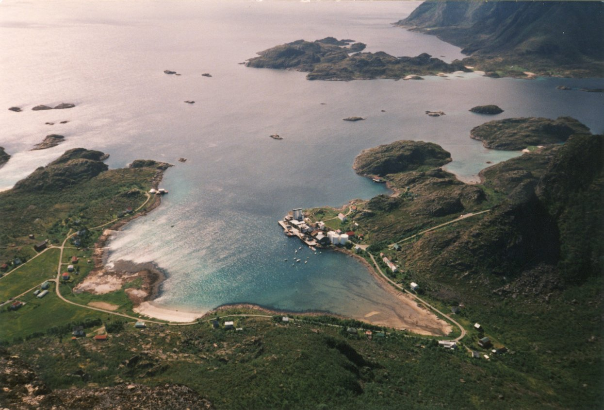 Brettesnes sett fra Sponga